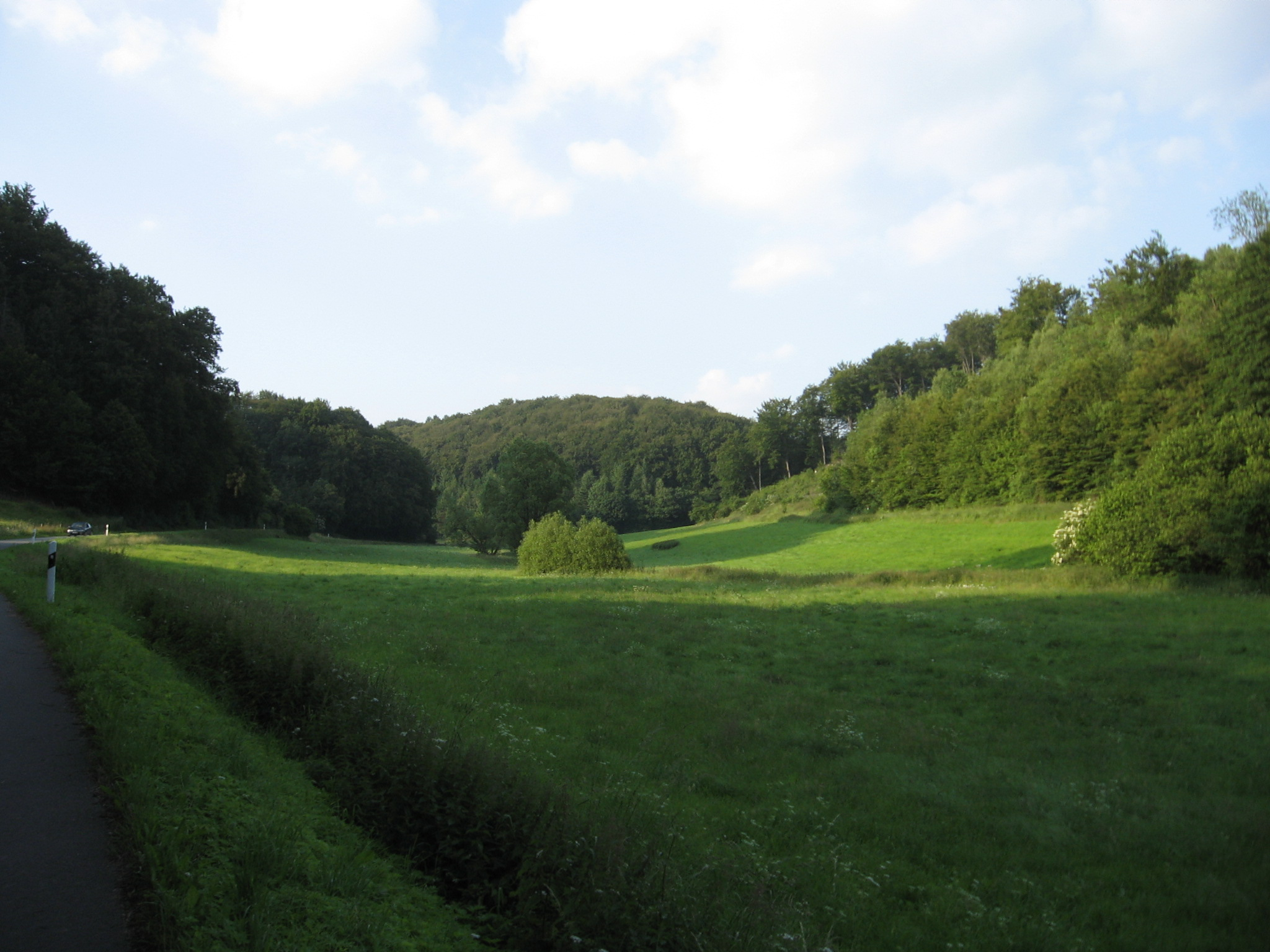 Melbecketal im Bereich des Naturschutzgebietes Melbecketal und Rübenkamp, nordwestlich von Lennestadt-Elspe (NRW).